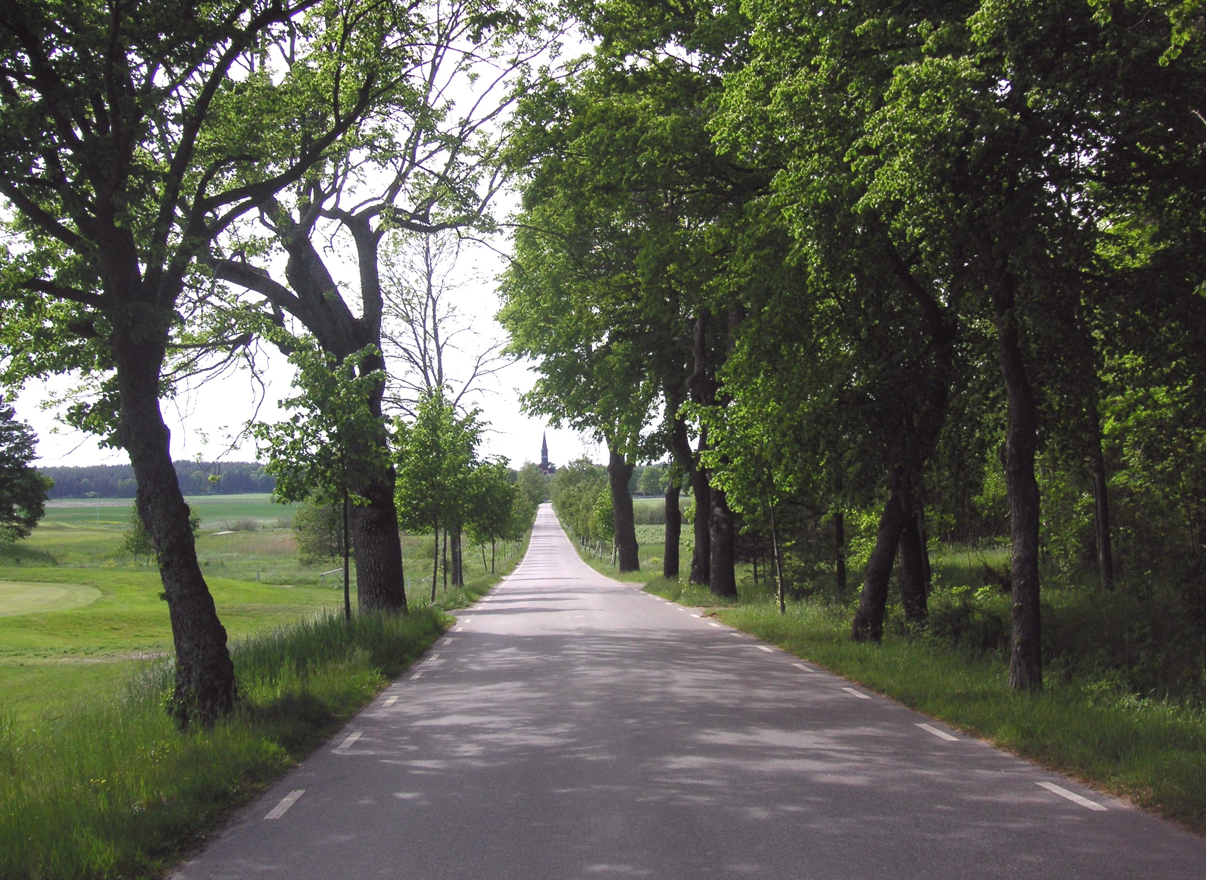 Lovö kyrkväg, vy mot väst med Lovö kyrka i bakgrunden.